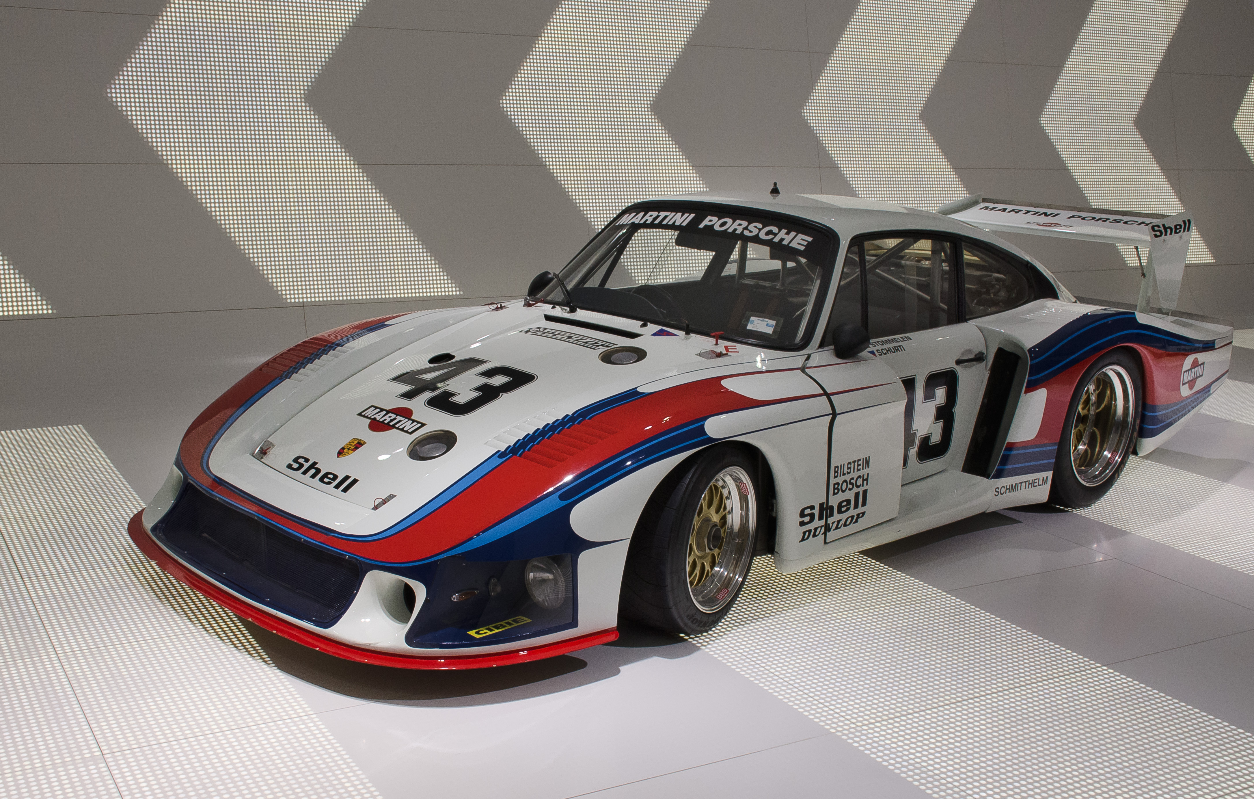 Porsche 935/78 "Moby Dick", Porsche-Museum, Stuttgart, Germany